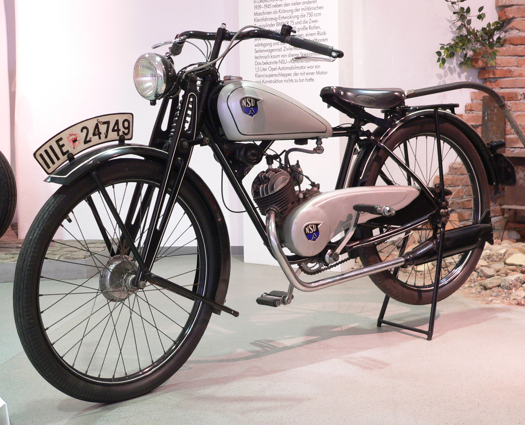 Motorbike "NSU-D Quick" (1936) at the Deutsches Zweirad- und NSU-Museum